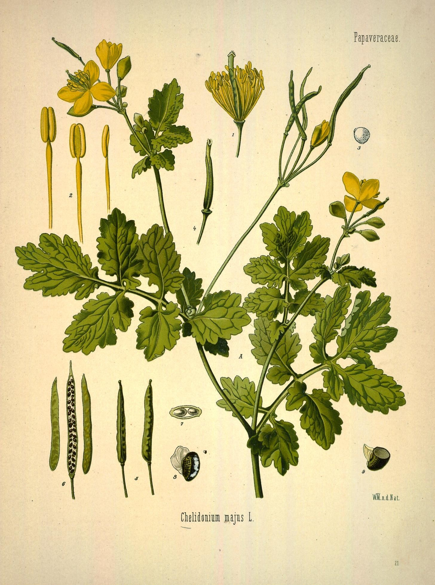 Schöllkraut. A Pflanze in natürl. Grösse; 1 innere Blüthe, vergrössert; 2 Staubgefässe von verschiedenen Seiten, desgl.; 3 Pollen, desgl.; 4 Stempel, desgl.; 5 geschlossene Frucht, natürl. Grösse; 6 geöffnete Frucht, desgl.; 7 Stempel im Querschnitt, desgl.; 8 Same, natürl. Grösse und vergrössert; 9 derselbe im Querschnitt, vergrössert.